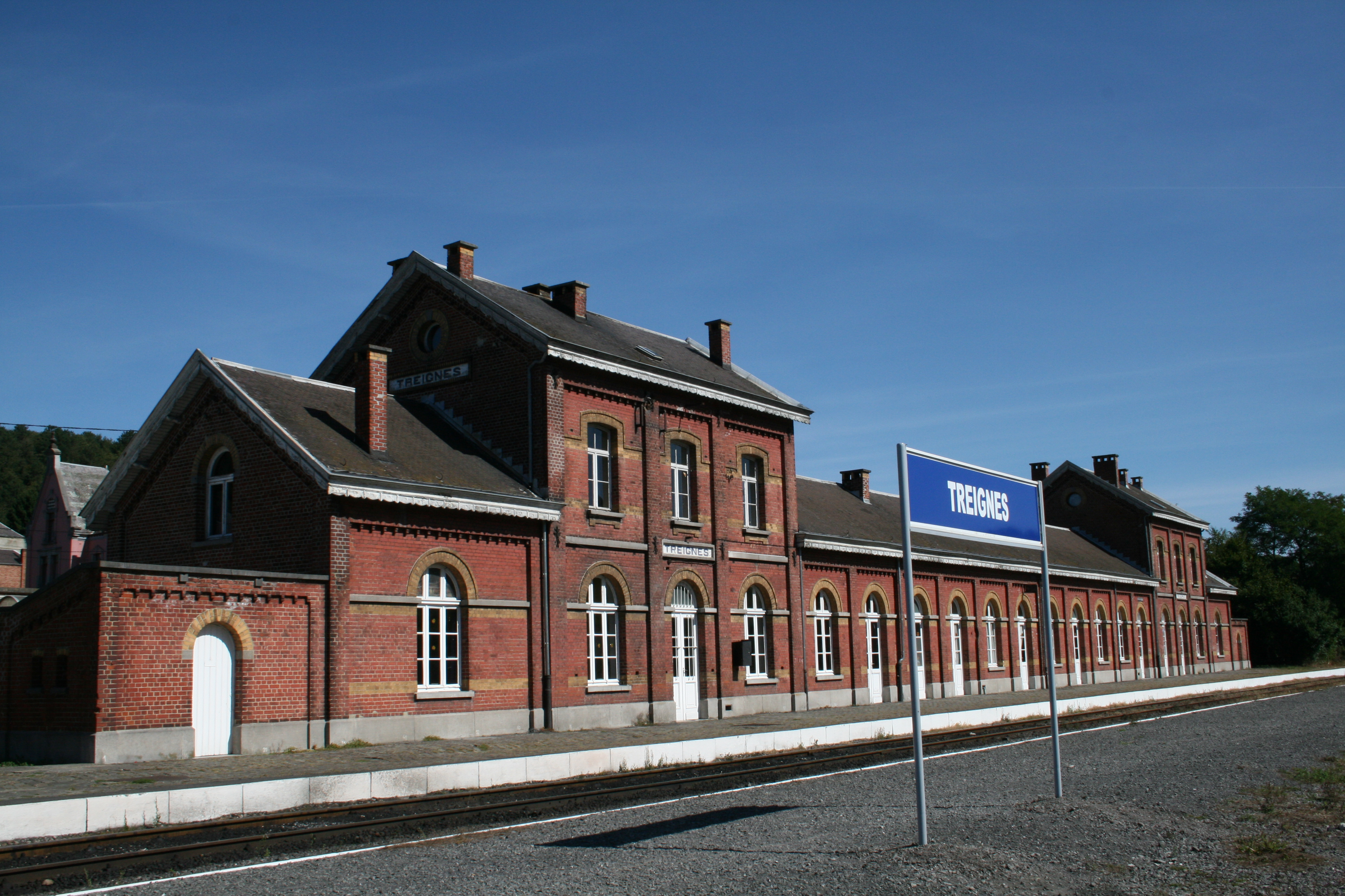 Treignes (Belgique) - Gare de Treignes (terminus de la ligne touristique du Chemin de Fer à Vapeur des 3 Vallées)